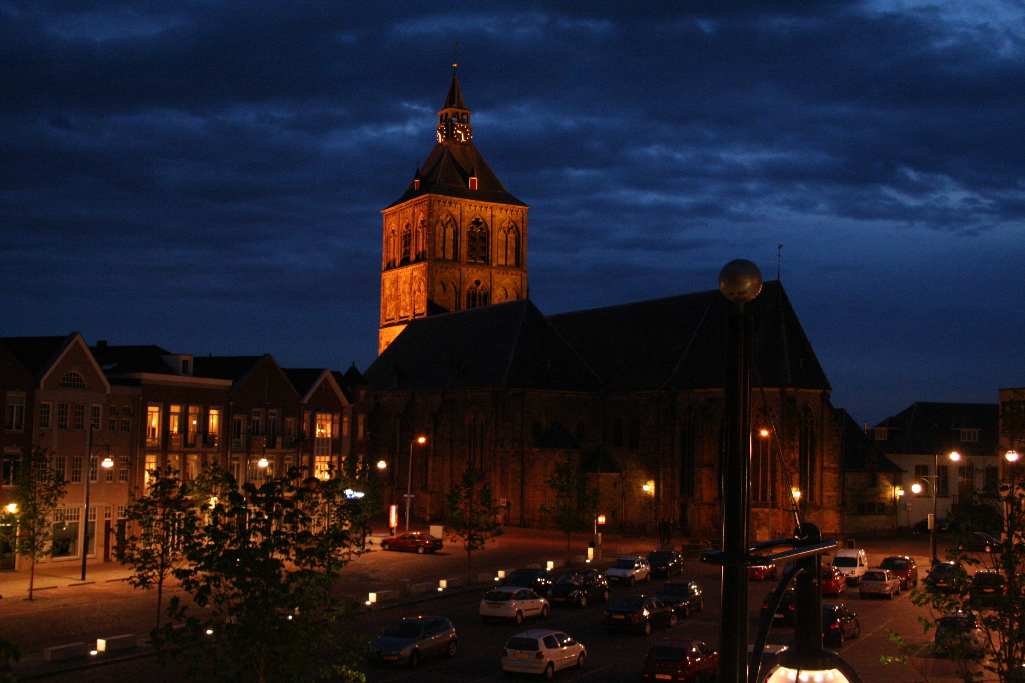 St. Plechelmusbasiliek te Oldenzaal in de avond